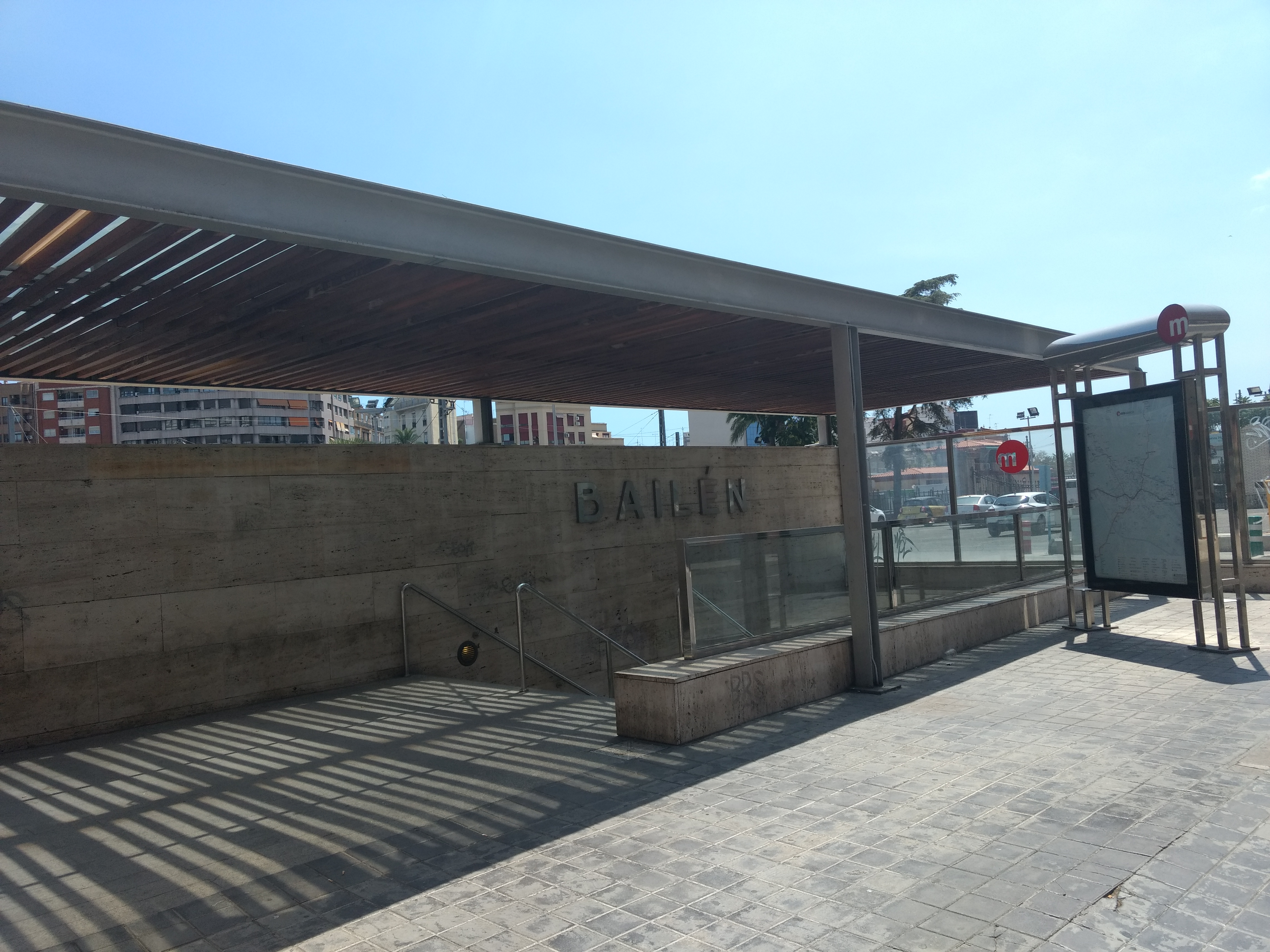 Entrada a la parada de metro de Bailén.